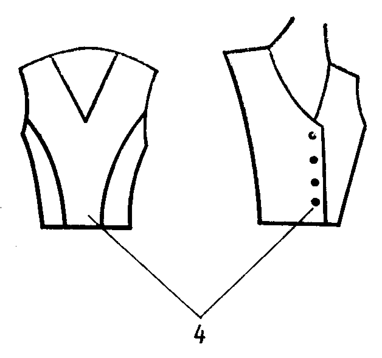 Изображение из ГОСТ 22977-89 (СТ СЭВ 6484-88) — Детали швейных изделий. Термины и определения.